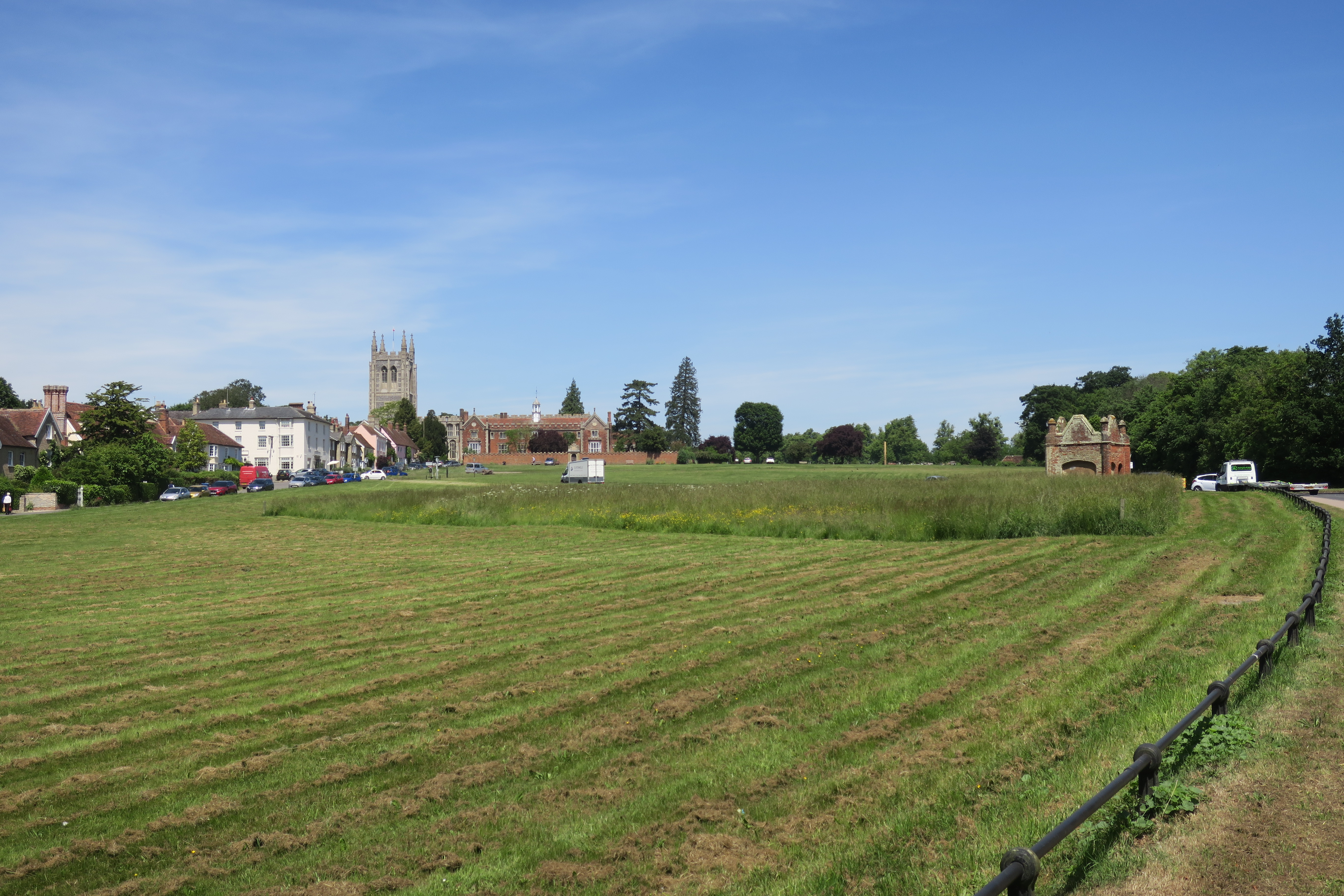 Long Melford, noorden van het centrum